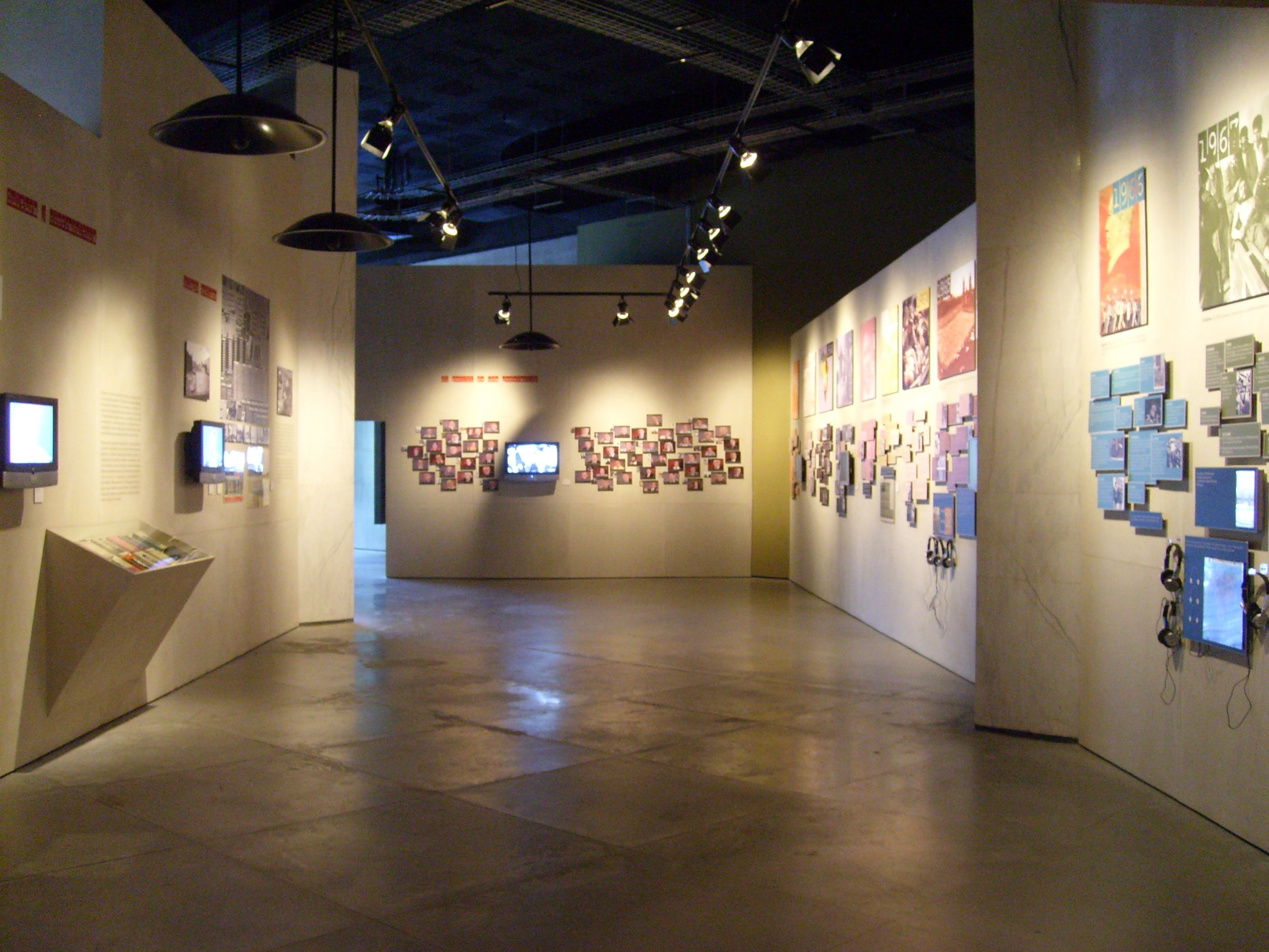 vista del memorial del 68 en el CCUT